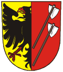 Znak města Horní Benešov